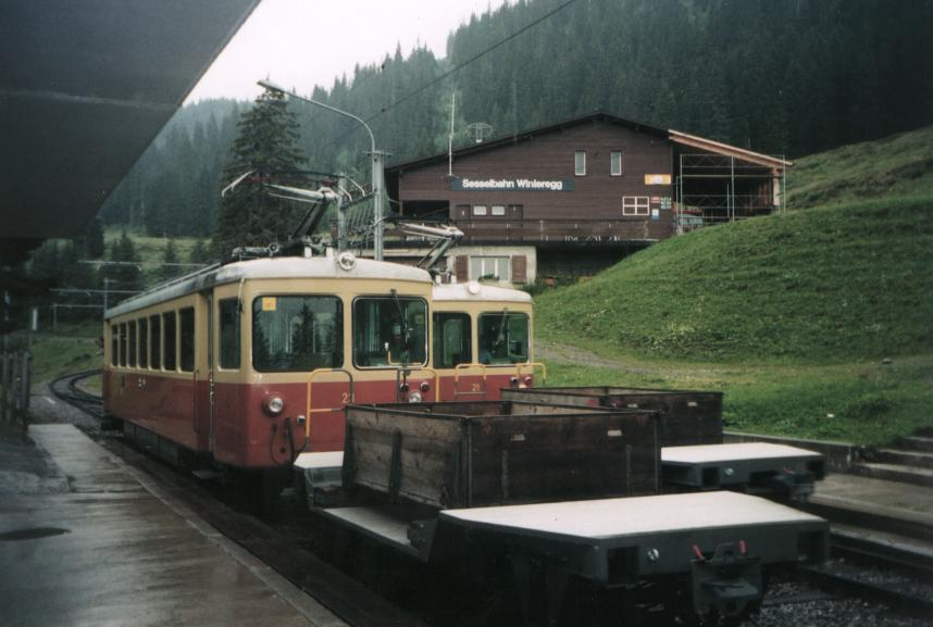 Description